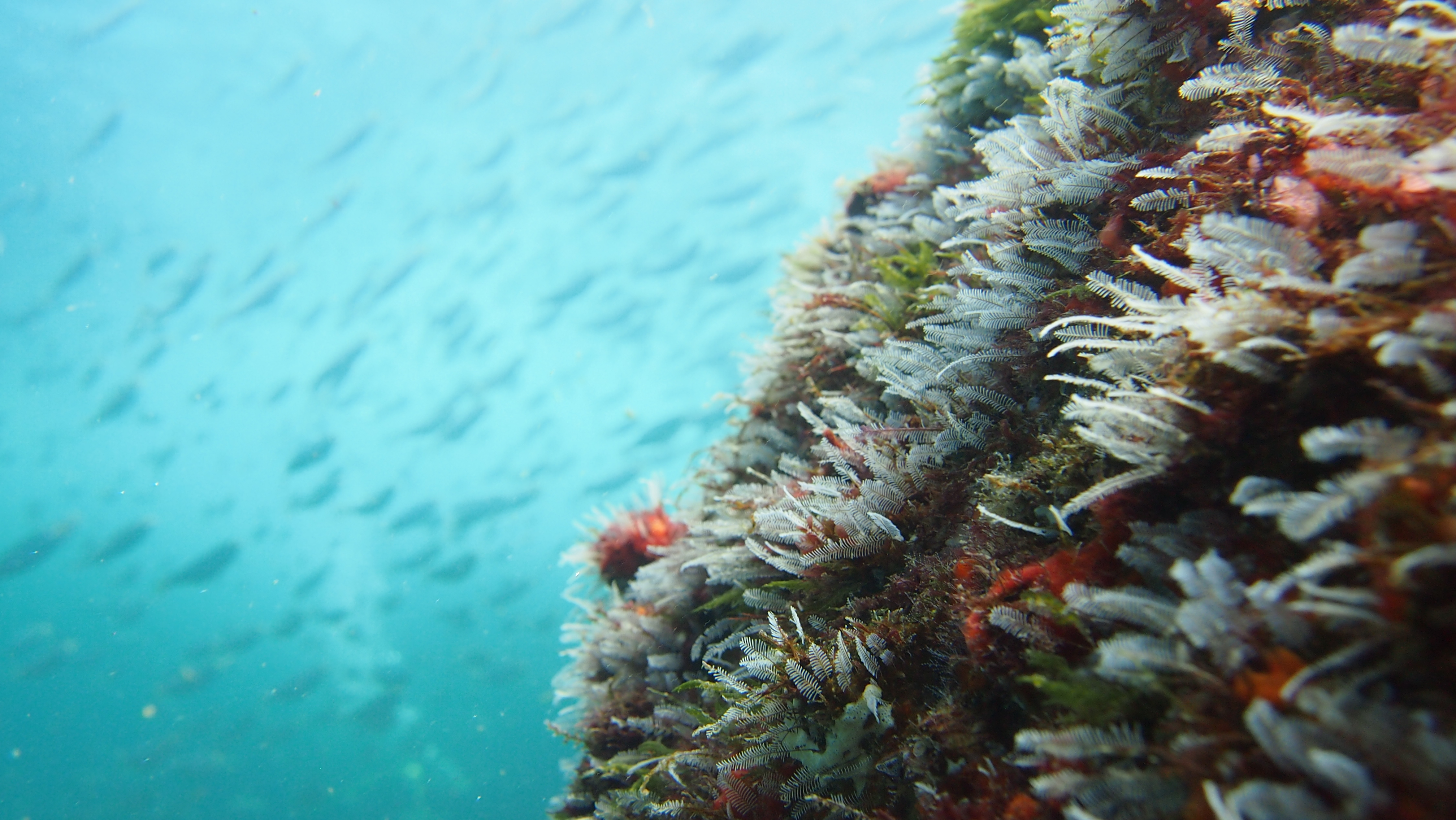 Uma das áreas do Parque Estadual do Acaraí é o Arquipélago de Tamboretes, que além de uma linda paisagem fora da água, também abriga uma exuberante paisagem subaquática.